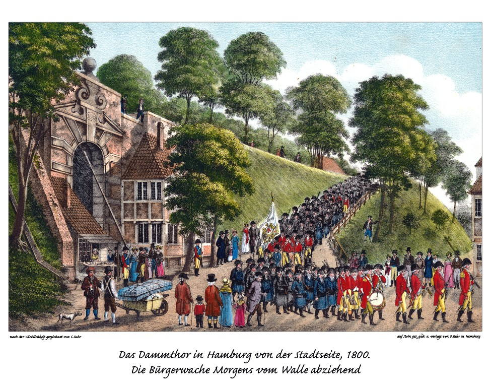 Hamburger Bürgerwache 1800 vom Dammtor abziehend